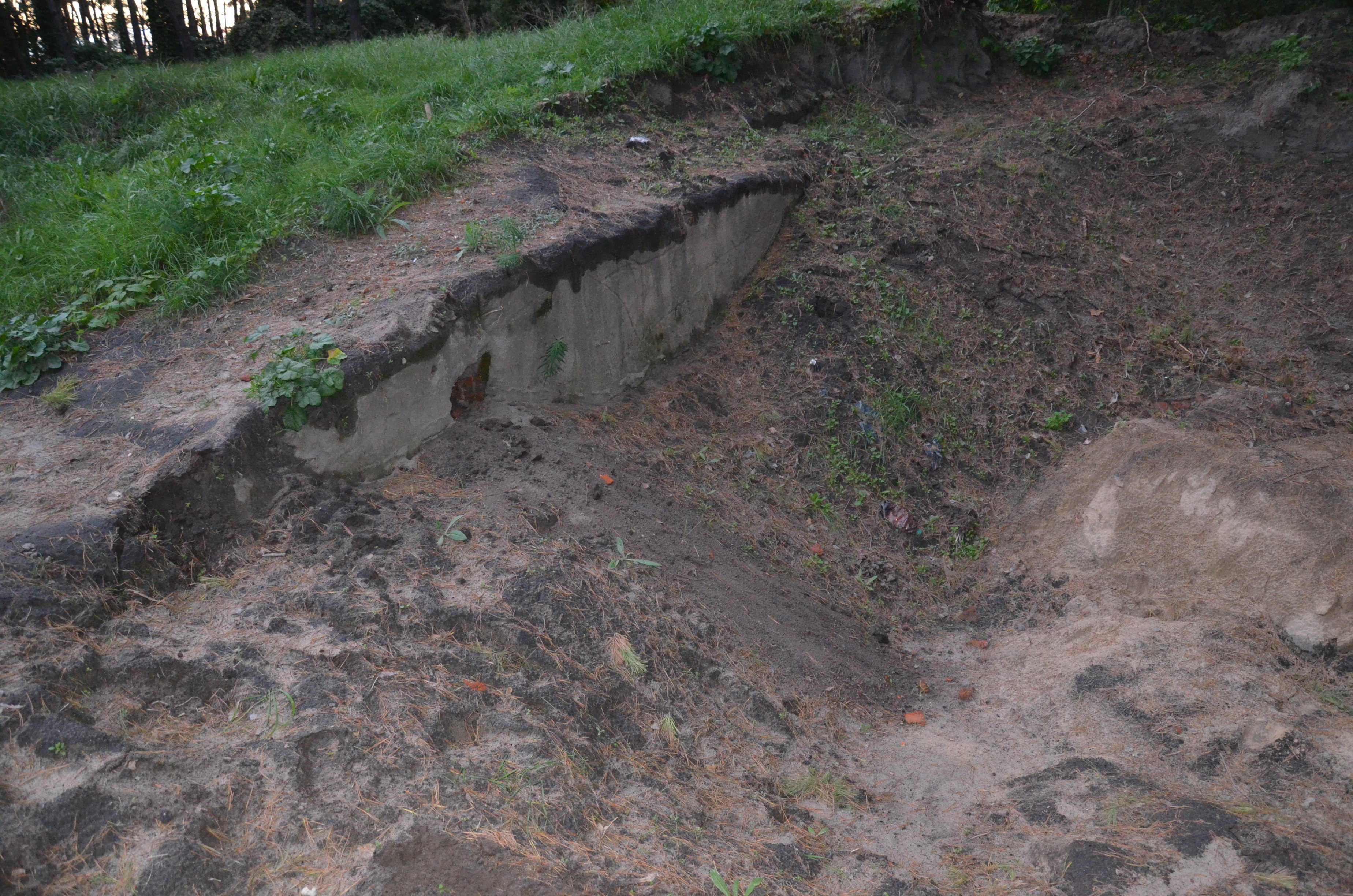 Городище "Коровель" , с. Шестовиця